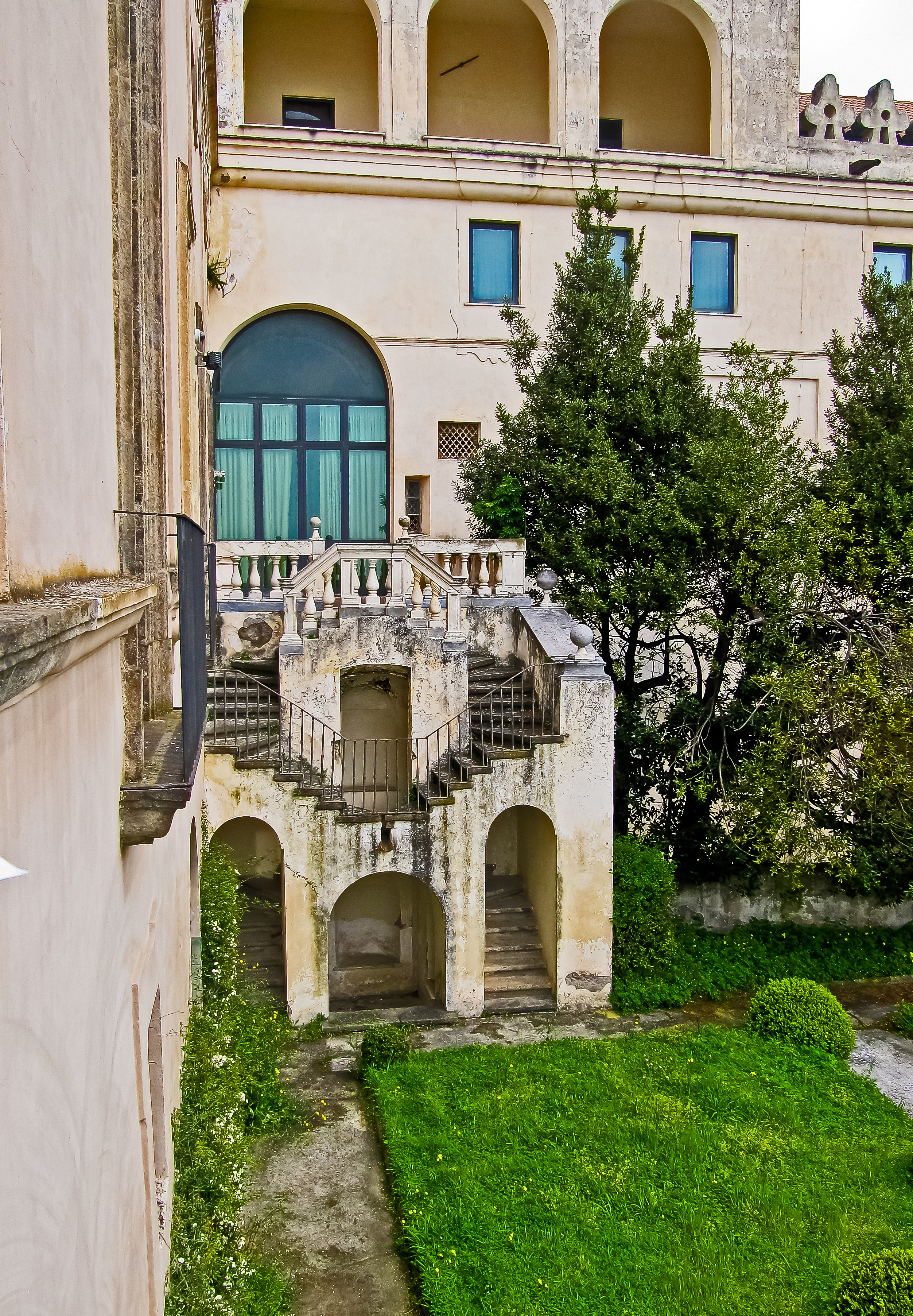 Scala a Calicò, Cosimo Fanzago